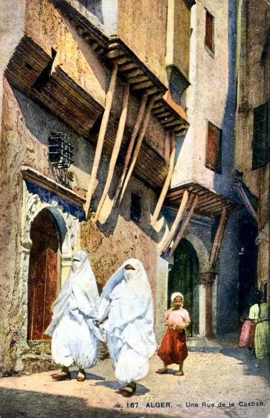 carte postale de la casbah - بطاقة بريدية للقصبة بالجزائر العاصمة